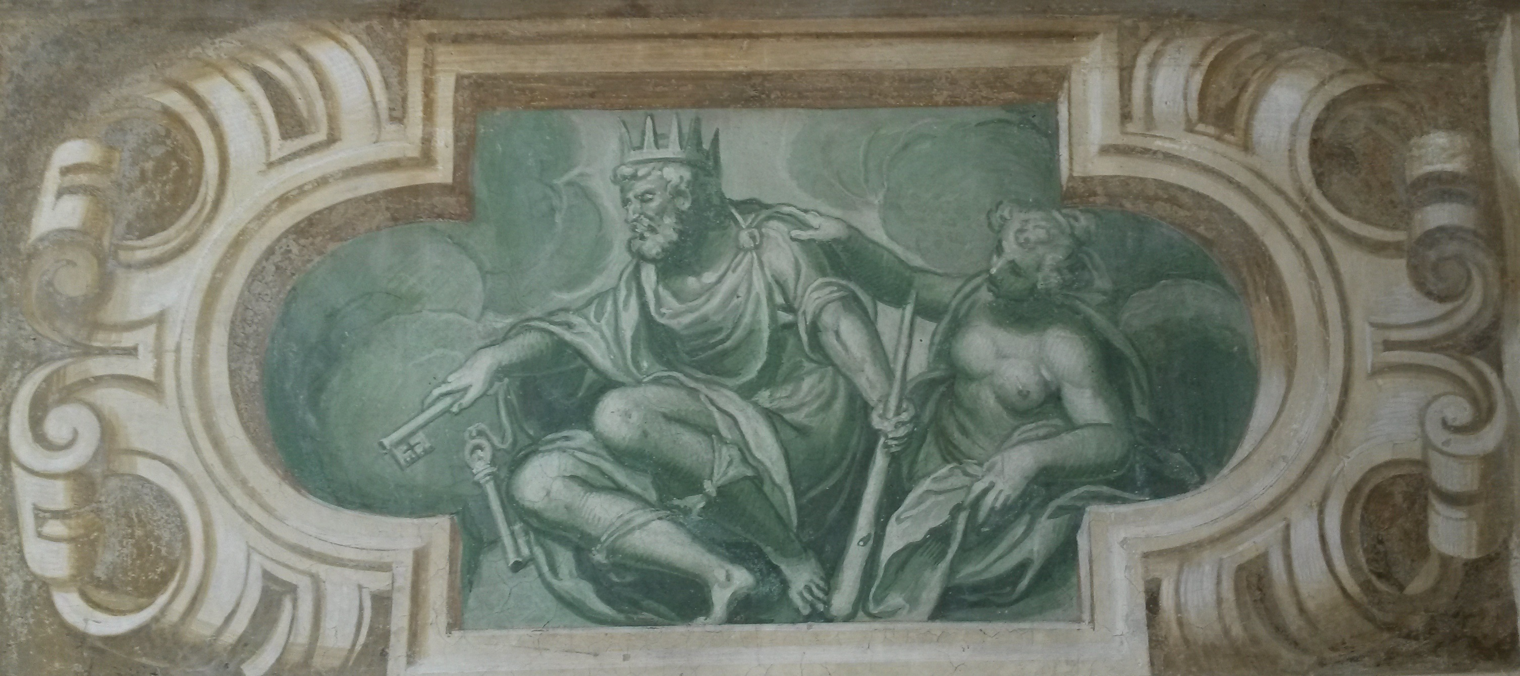 Paolo Farinati, "Giano bifronte", 1590 circa, affresco (restaurato nel 2016). Giano, da cui deriva il primo mese dell'anno, vigila l'entrata e l'uscita; è raffigurato sopra una porta.